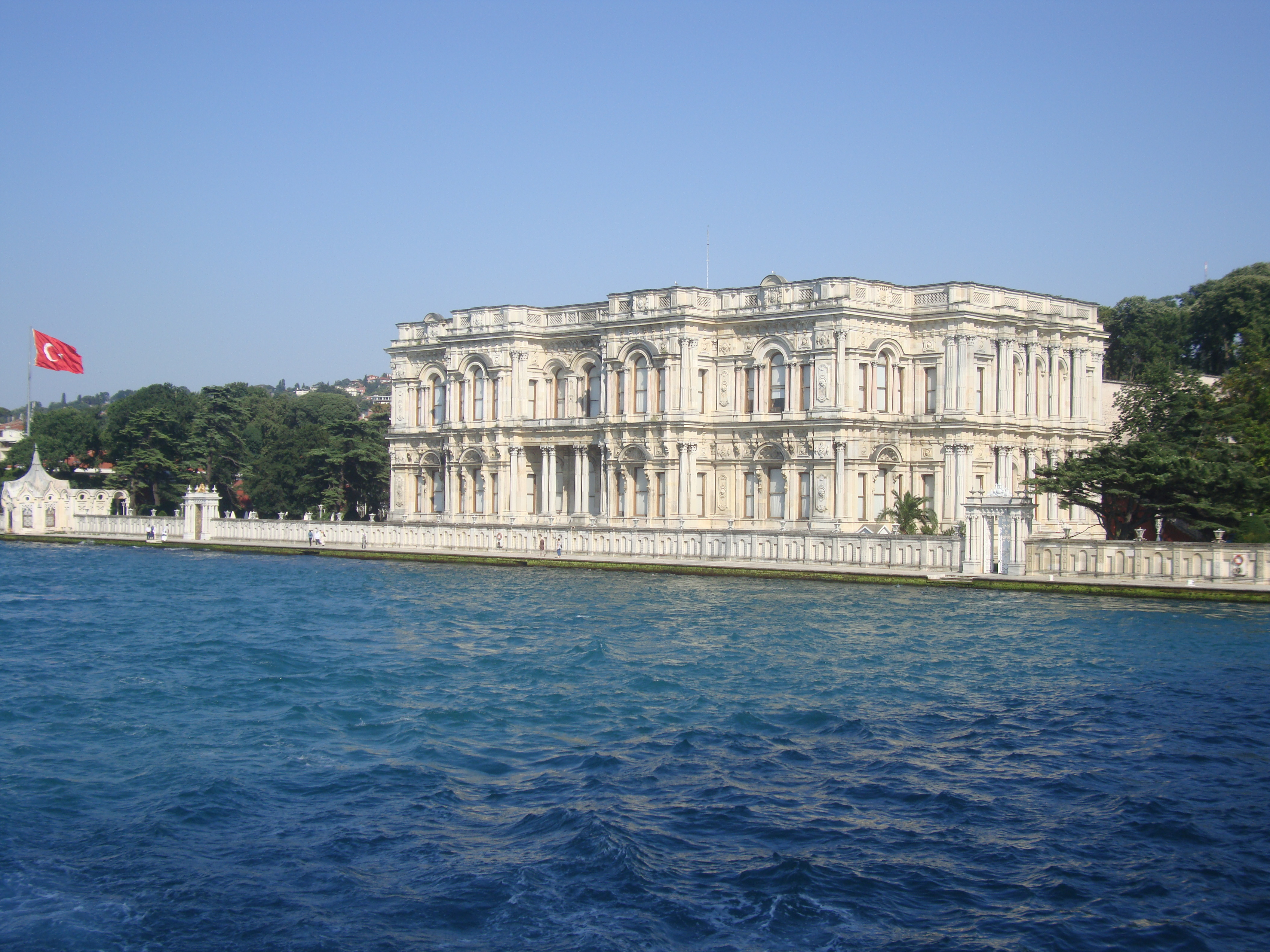 Beylerbeyi Palace, Istanbul